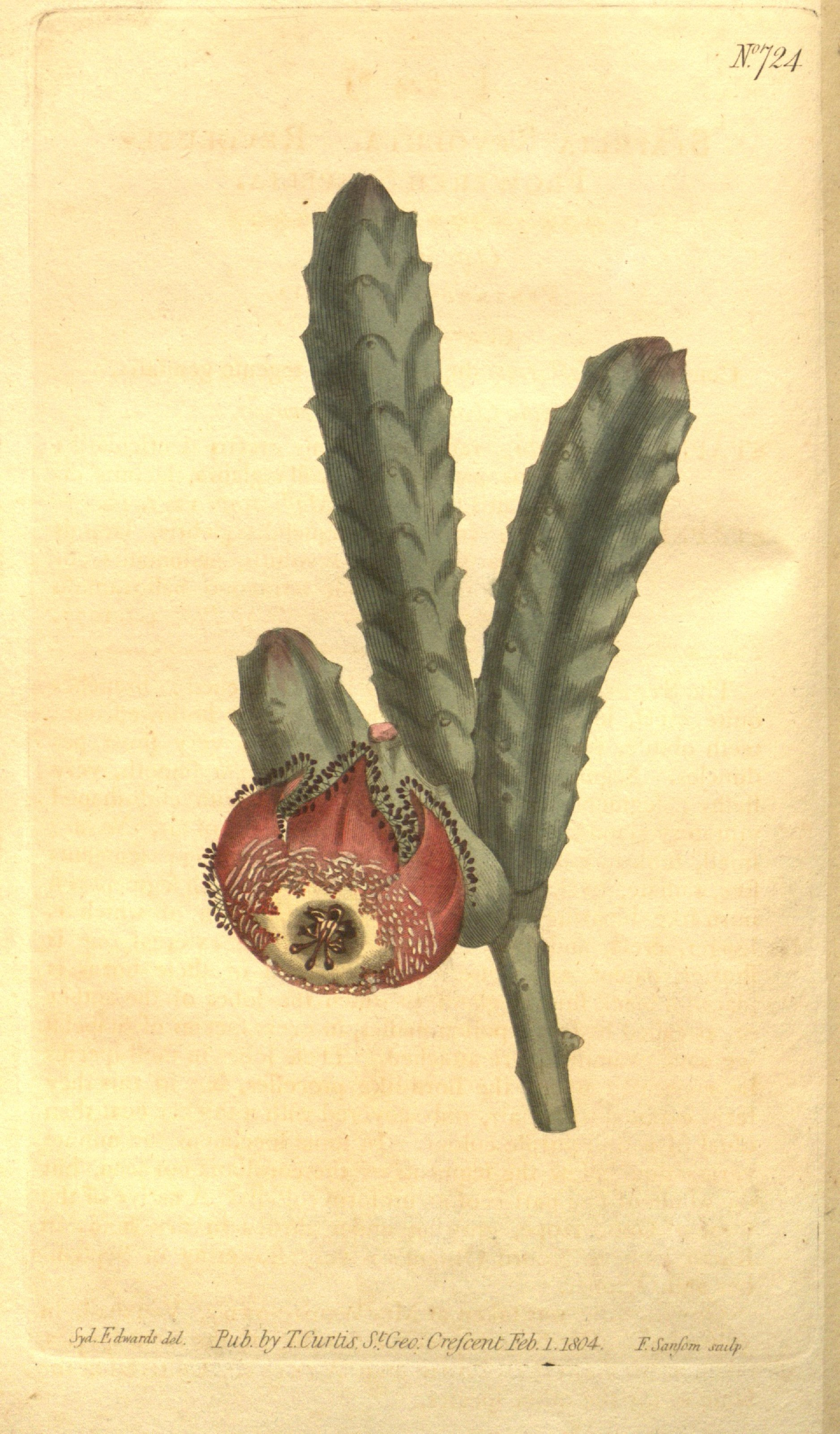 EJU iyJ.EJw,trdt j../. JPub. bv T.L M.1.1M